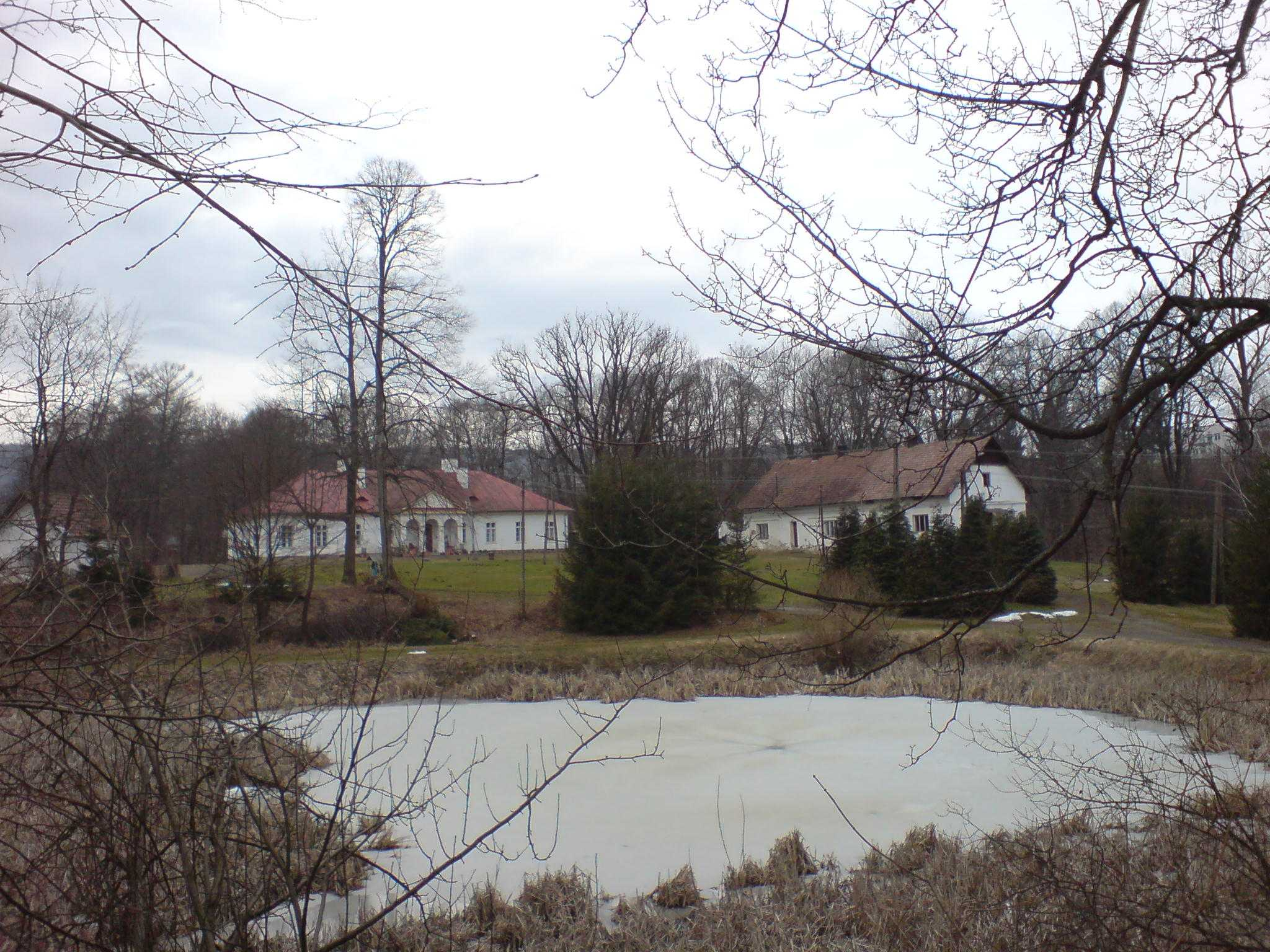 Dwór w Końskiem